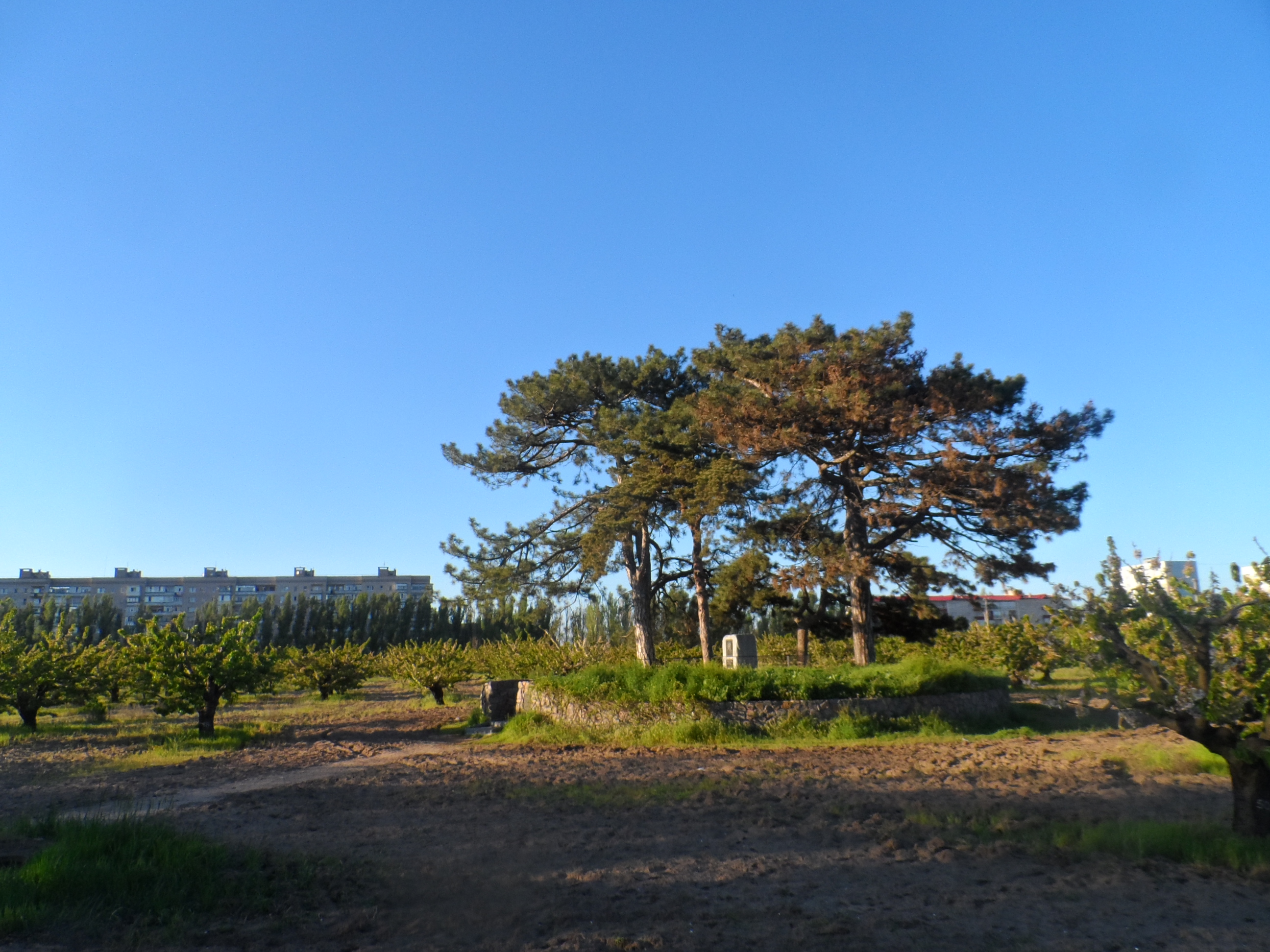 Сады Филибера